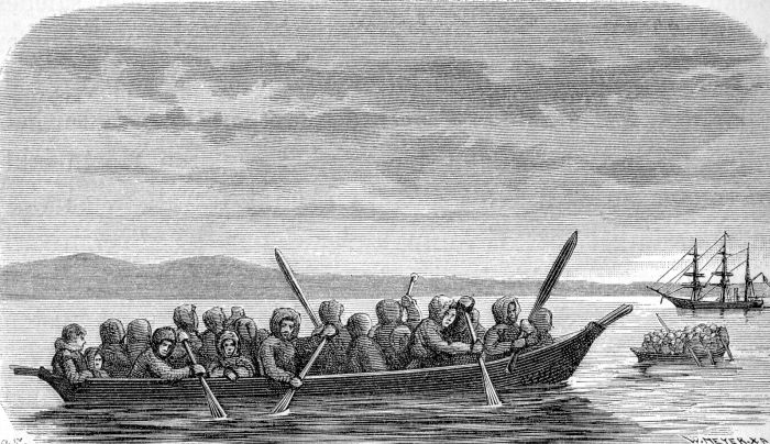 Tschuktschiska båtar